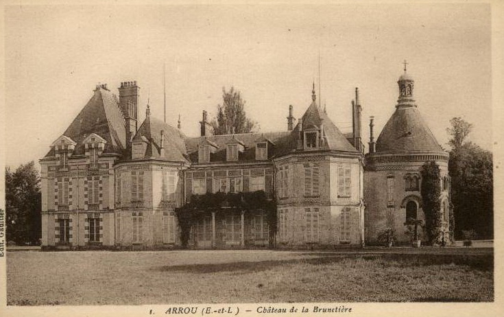 château de la Brunetière, Arrou, Eure-et-Loir, France.